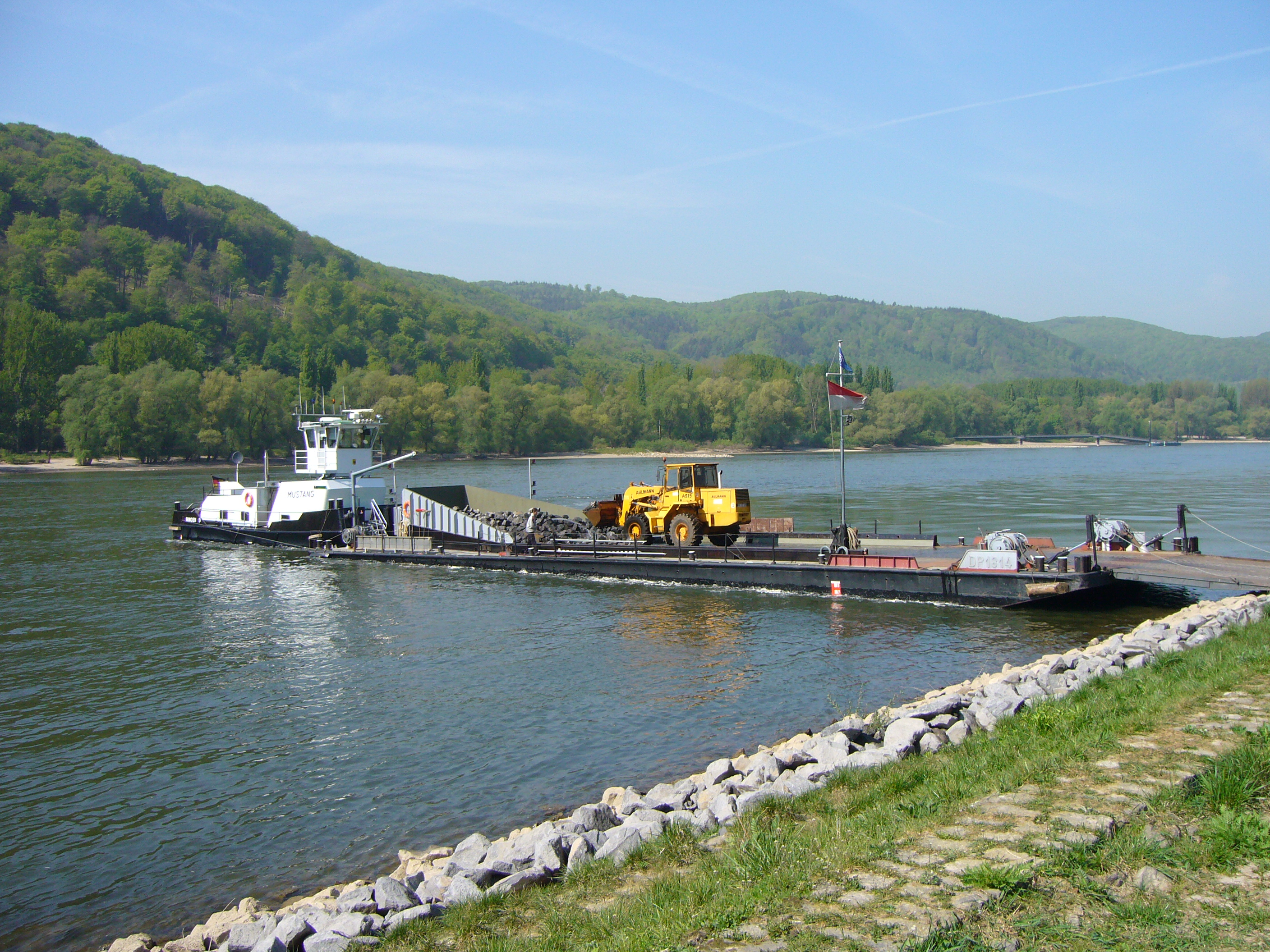 Arbeitsschiff Mustang mit Barge